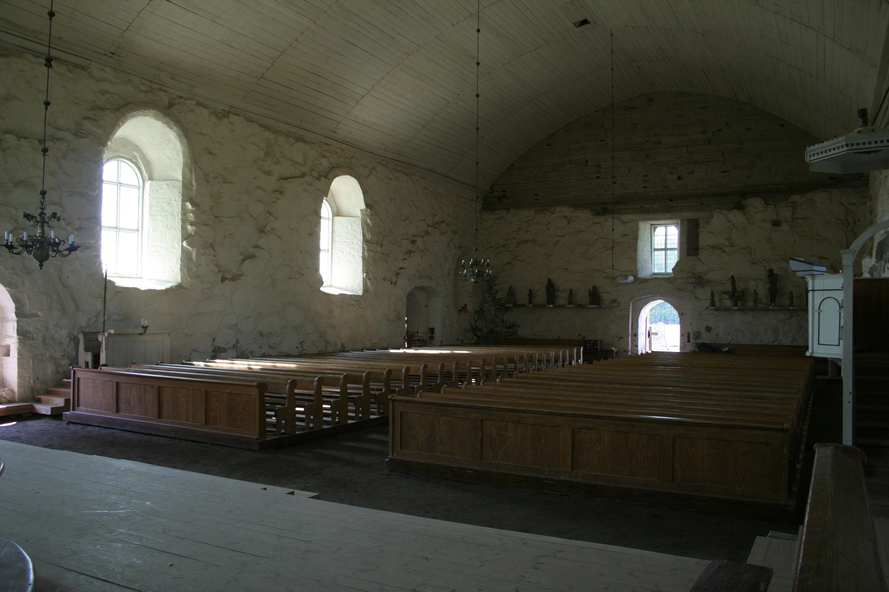 Sastamalan kirkko sisältä kuvattuna